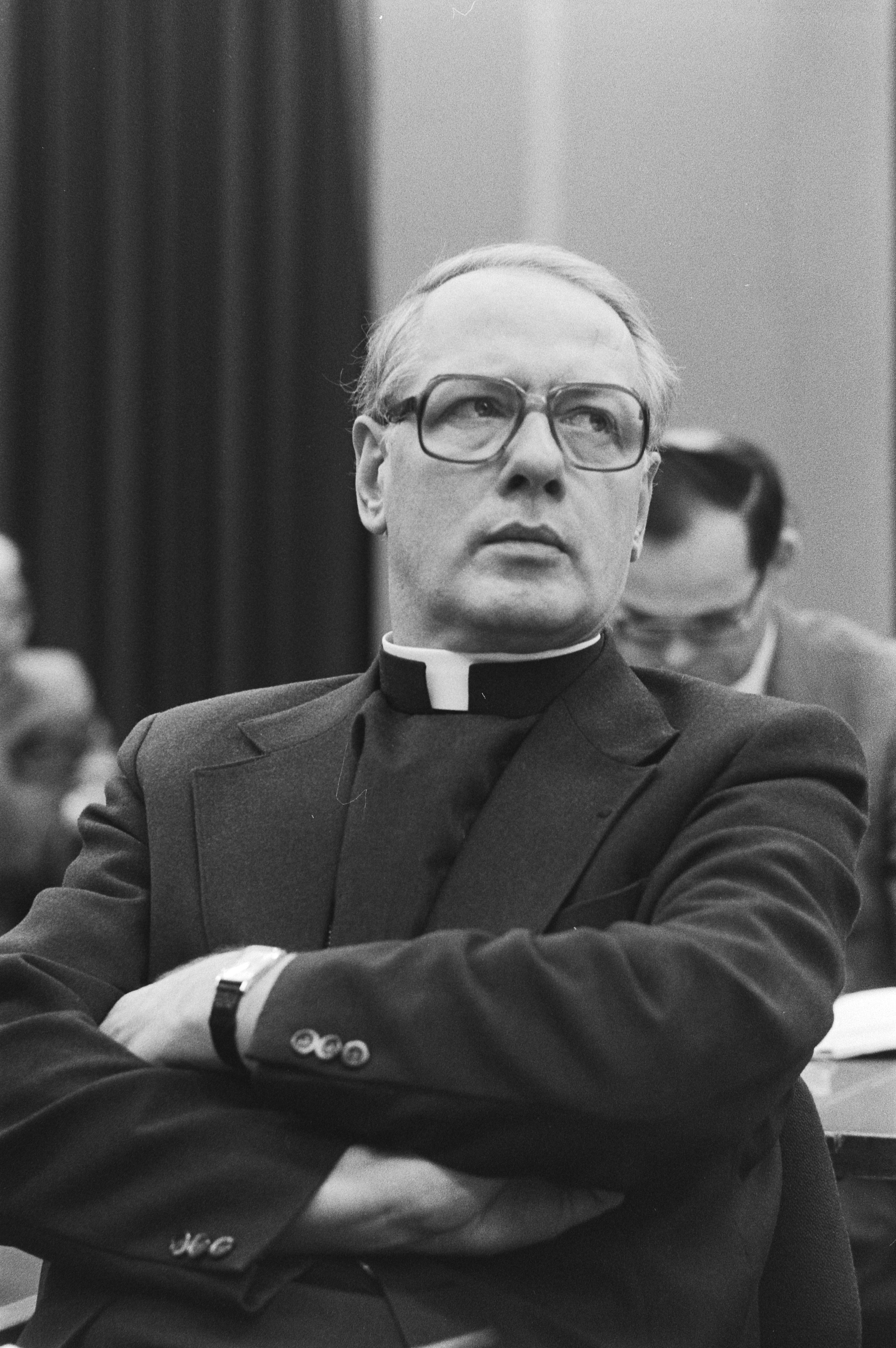 Collectie / Archief : Fotocollectie Anefo Reportage / Serie : Het derde landelijk pastoraal overleg Beschrijving : Bisschop Ad Simonis Datum : 17 januari 1981 Locatie : Utrecht (provincie), Utrecht (stad) Trefwoorden : bisschoppen, geestelijken, katholicisme, portretten Persoonsnaam : Simonis, Adrianus Fotograaf : Croes, Rob C. / Anefo, [onbekend] Auteursrechthebbende : Nationaal Archief Materiaalsoort : Negatief (zwart/wit) Nummer archiefinventaris : bekijk toegang 2.24.01.05 Bestanddeelnummer : 931-2667